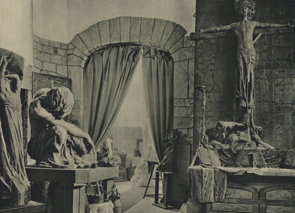 Ateliér Františka Bílka, Praha, 1927